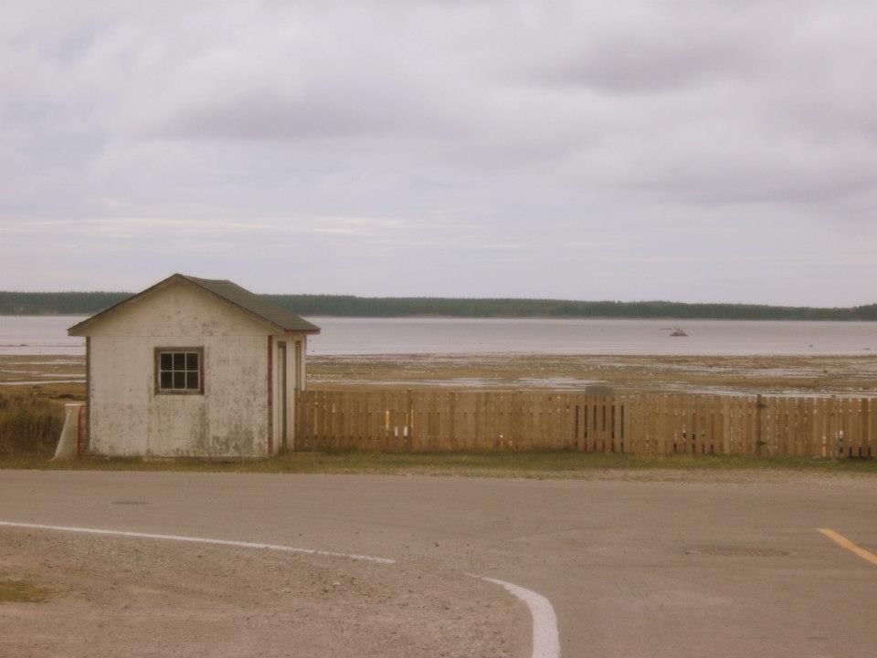 Baie Ellis, L'île-d'Anticosti